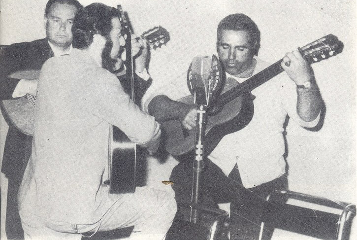 Fotografía de los payadores Juan Carlos Bares "el indio", Roberto Ayrala y Waldemar Lagos, en la audición "Amanecer argentino", aparecida en la revista argentina "Rincón del Payador" nº4, en setiembre de 1980.